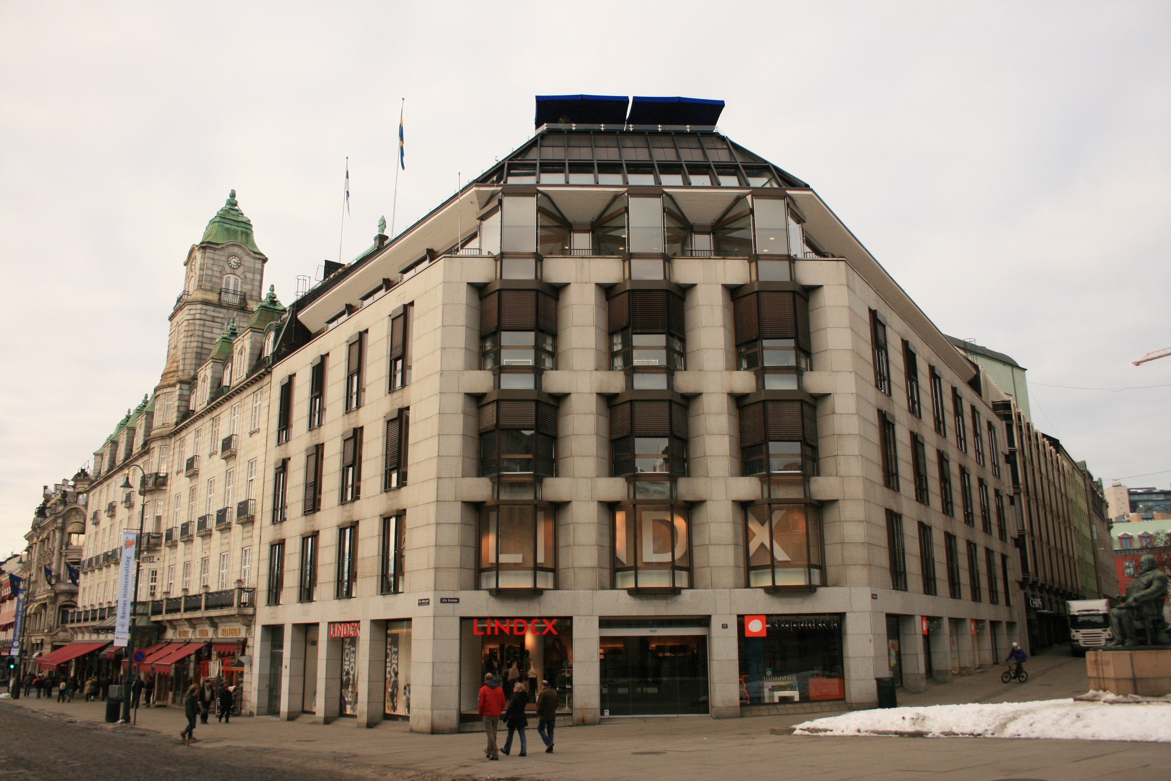 Karl Johans gate 27. Bygget for Fellesbanken 1974, arkitekt Torp & Torp.